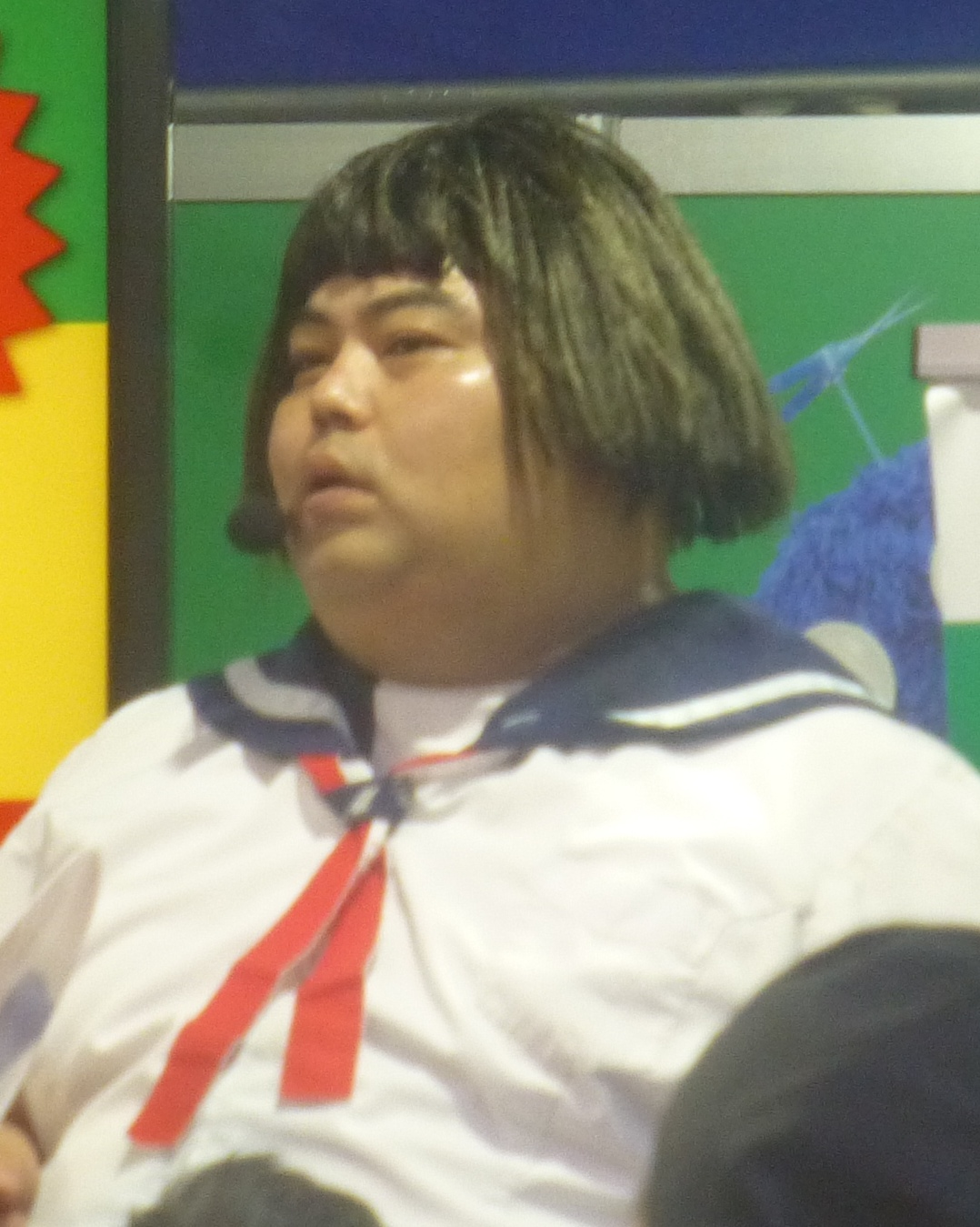 響（ひびき、Hibiki）は、日本のお笑いコンビ。秋葉原にて